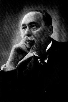 Isaac Hourwich - Исаак Аронович Гурвич. Фронтиспис мемуаров Oysgevehlte shriften (1917).